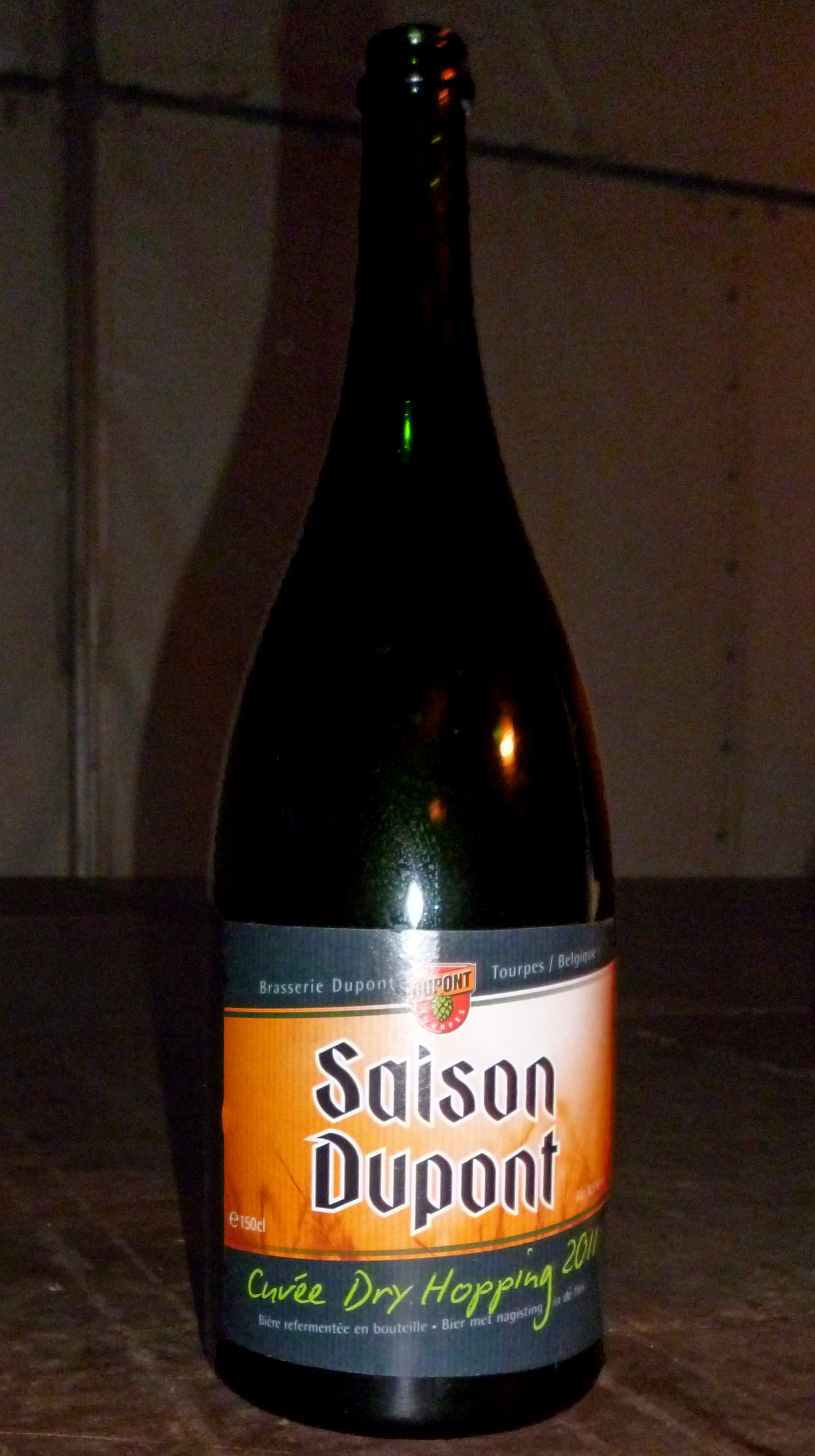 Saisont Dupont Cuvée Dry Hopping